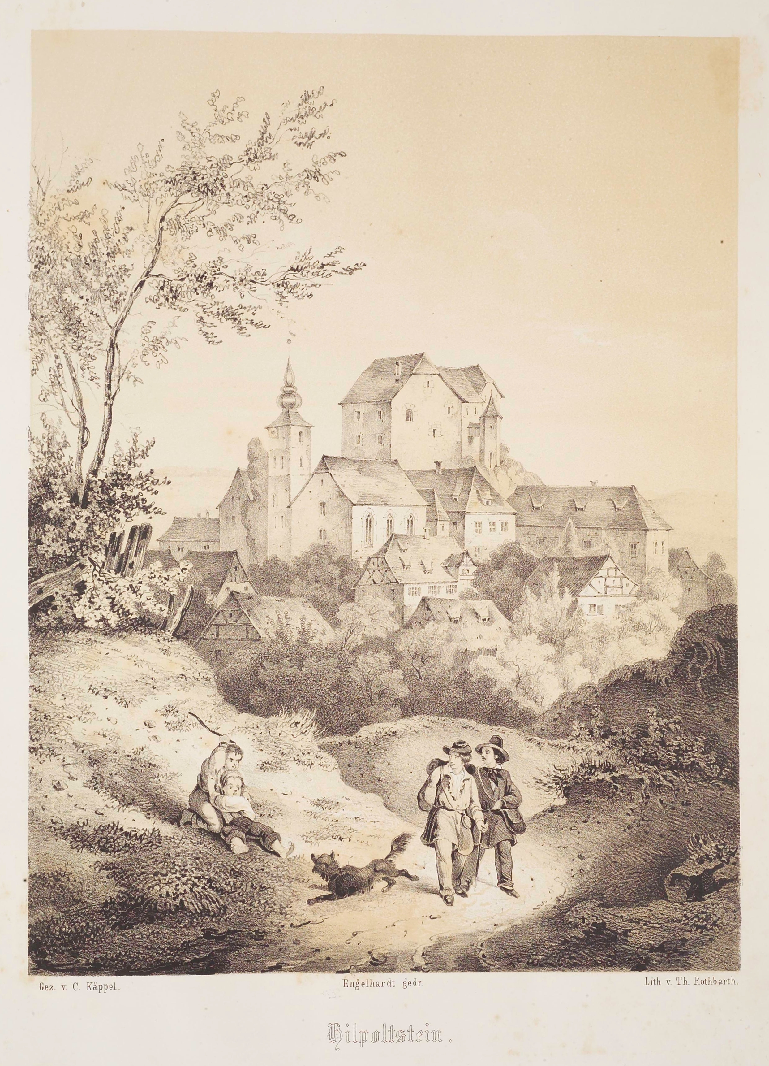 Burg Hiltpoltstein in Fränkische Schweiz. Cyclus der der interessantesten Punkte aus der Umgegend von Muggendorf und Streitberg. Sechzehn in Ton gedruckte Lithographien. Nach Originalzeichnungen von C. Kaeppel lithographirt von Th. Rothbarth.